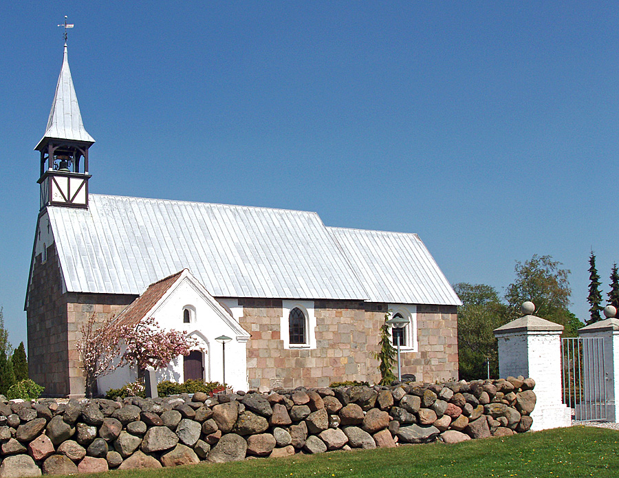 Lyngby Kirke, Århus Kommune, Denmark Image by me Nico-dk/Nils Jepsen